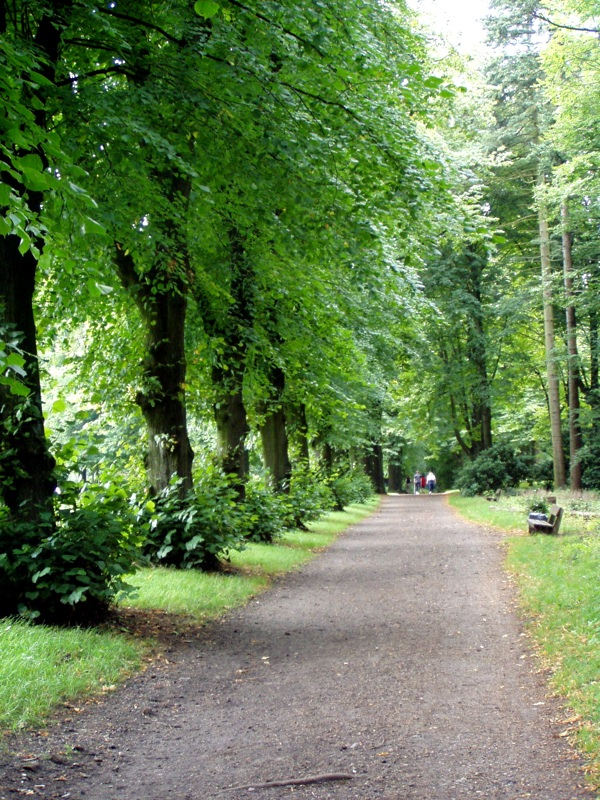 Volkspark